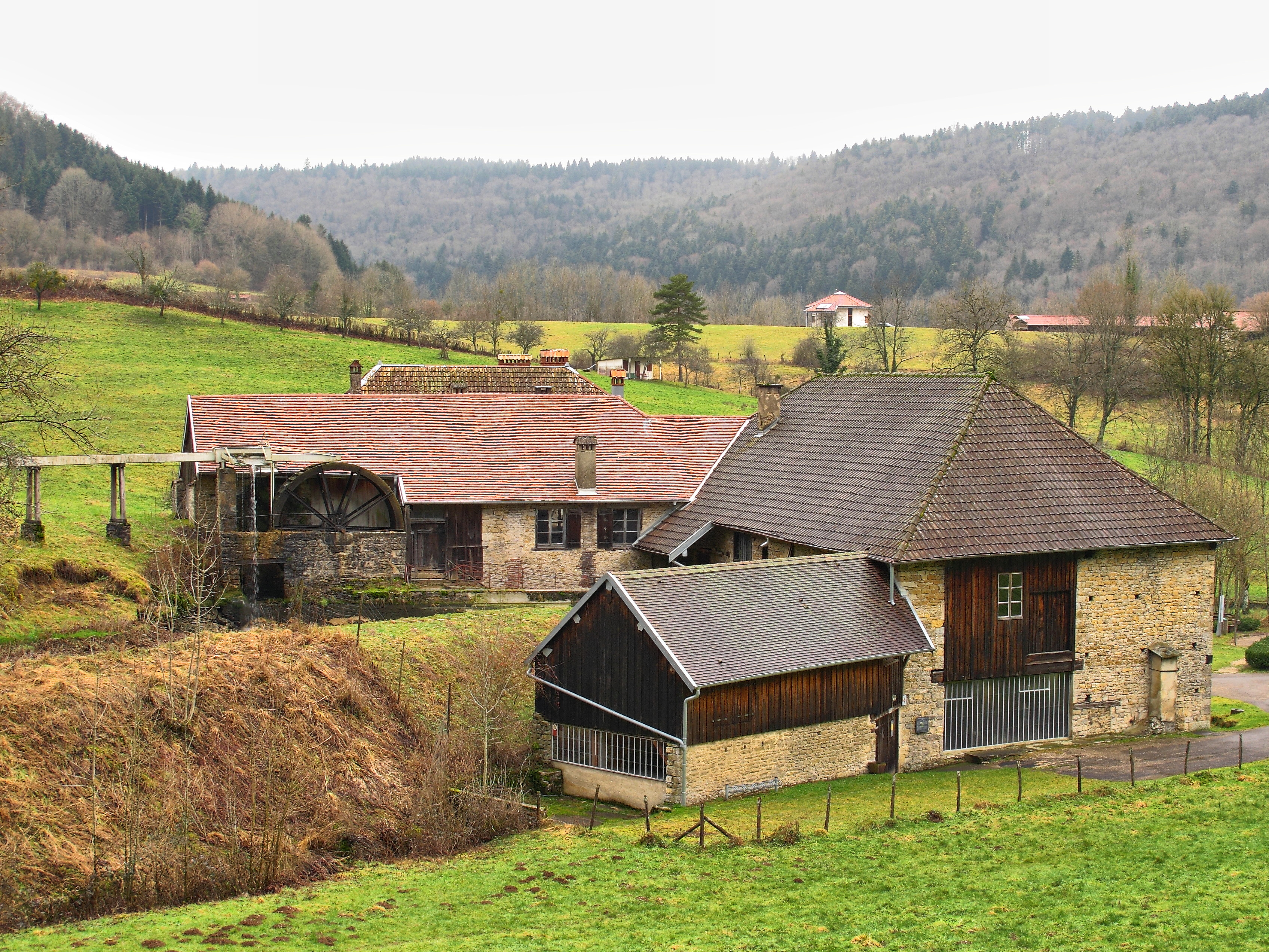 Classé aux monuments historiques sous le numéro : PA00101695